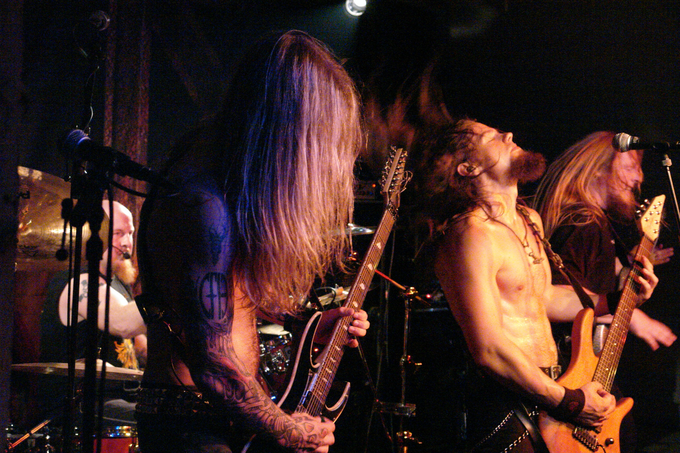 Faroese Viking Metal band Týr in Copenhagen